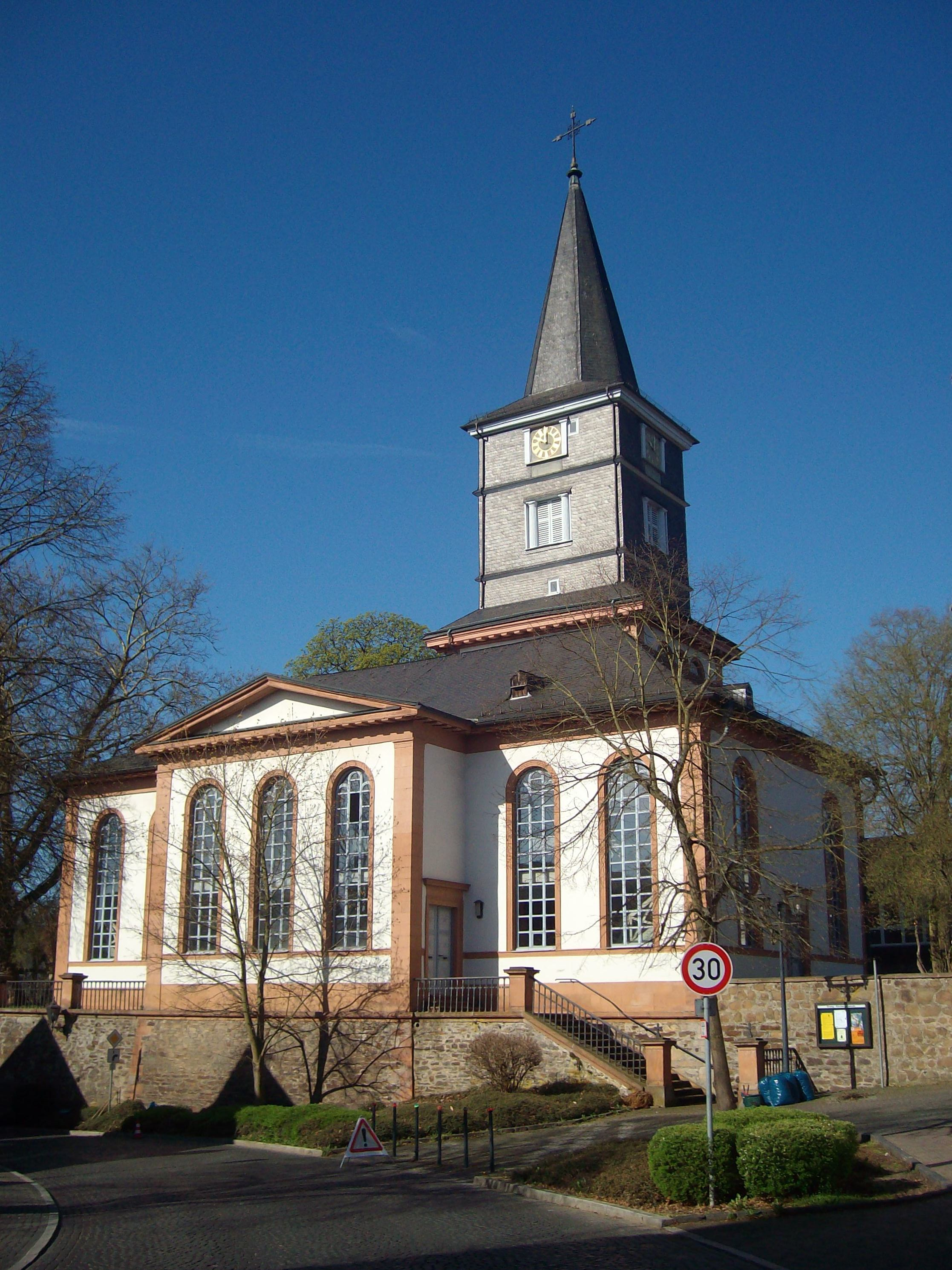 Evangelische Kirche Wißmar, Landkreis Gießen, Hessen, Deutschland